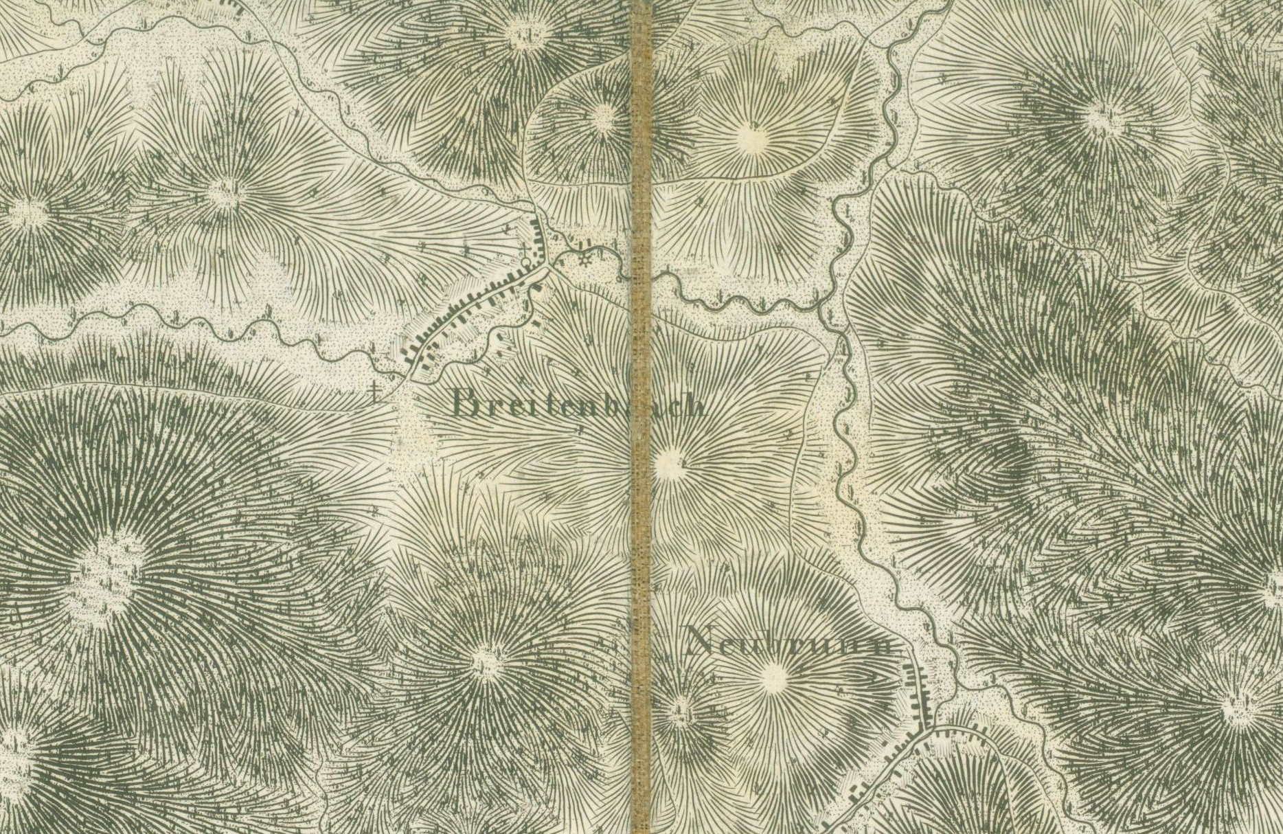 Auschnitt aus Blatt 20 der Haas´schen Karte mit den Dörfern Breitenbach und Neubrunn dem heutigen Ernsttal. ACHTUNG die Karte muss etwa 30° im Uhrzeigersinn gedreht werden, damit Norden oben ist.